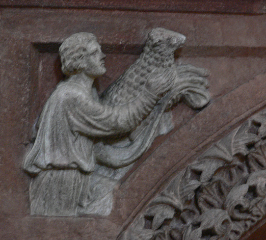 Wechselburg, Landkreis Mittelsachsen: Kloster Wechselburg, Romanische Basilika Lettner, Detail der Lettnerkanzel: Relief "Abel opfert das Lamm"